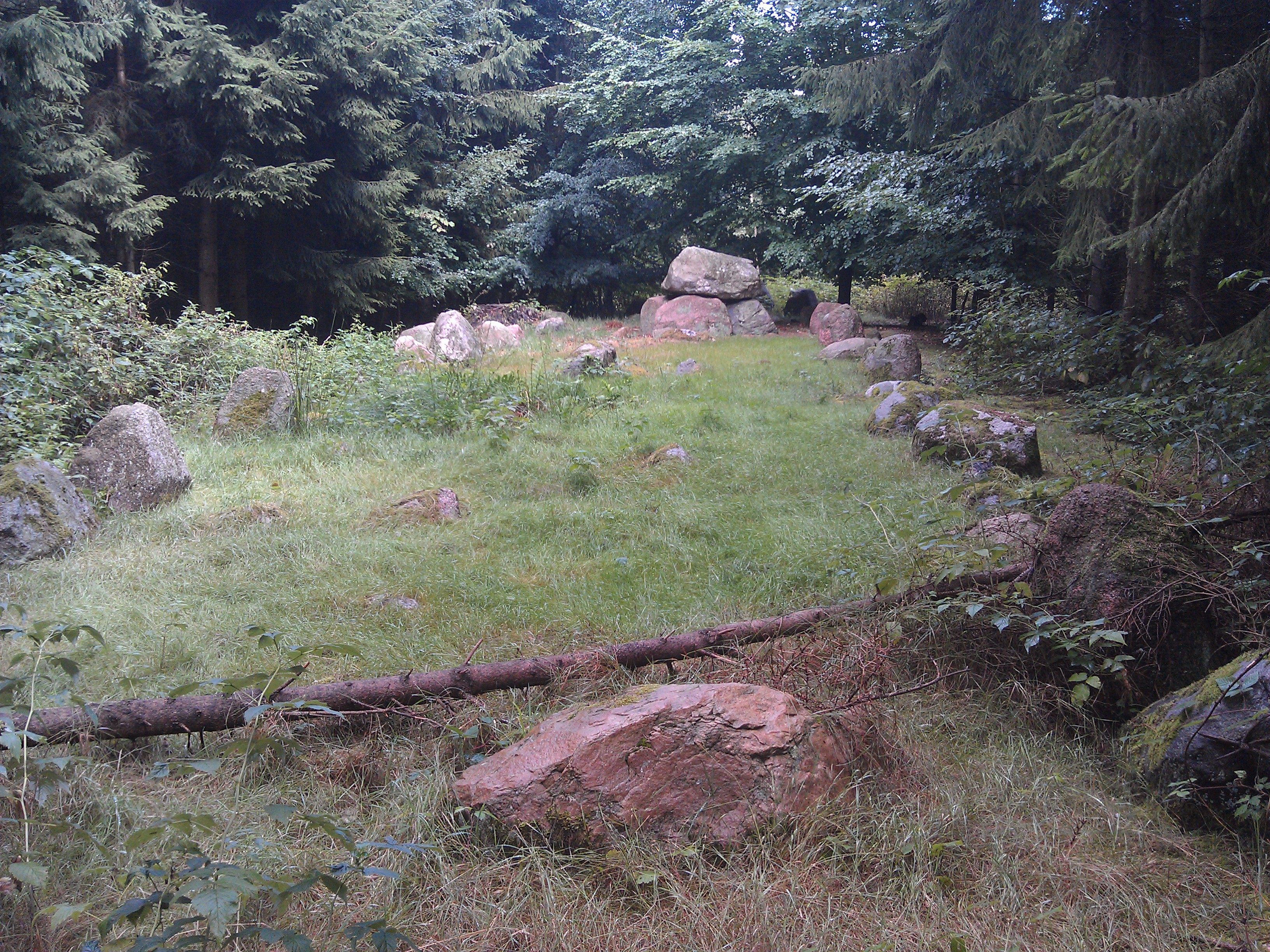 Avnede Skov